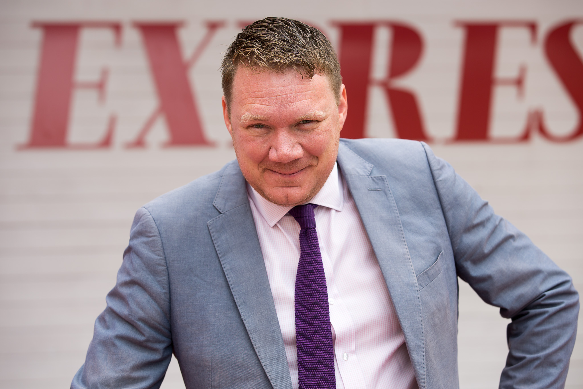 Niklas Svensson, journalist Expressen och lite av en "Almedalsexpert".